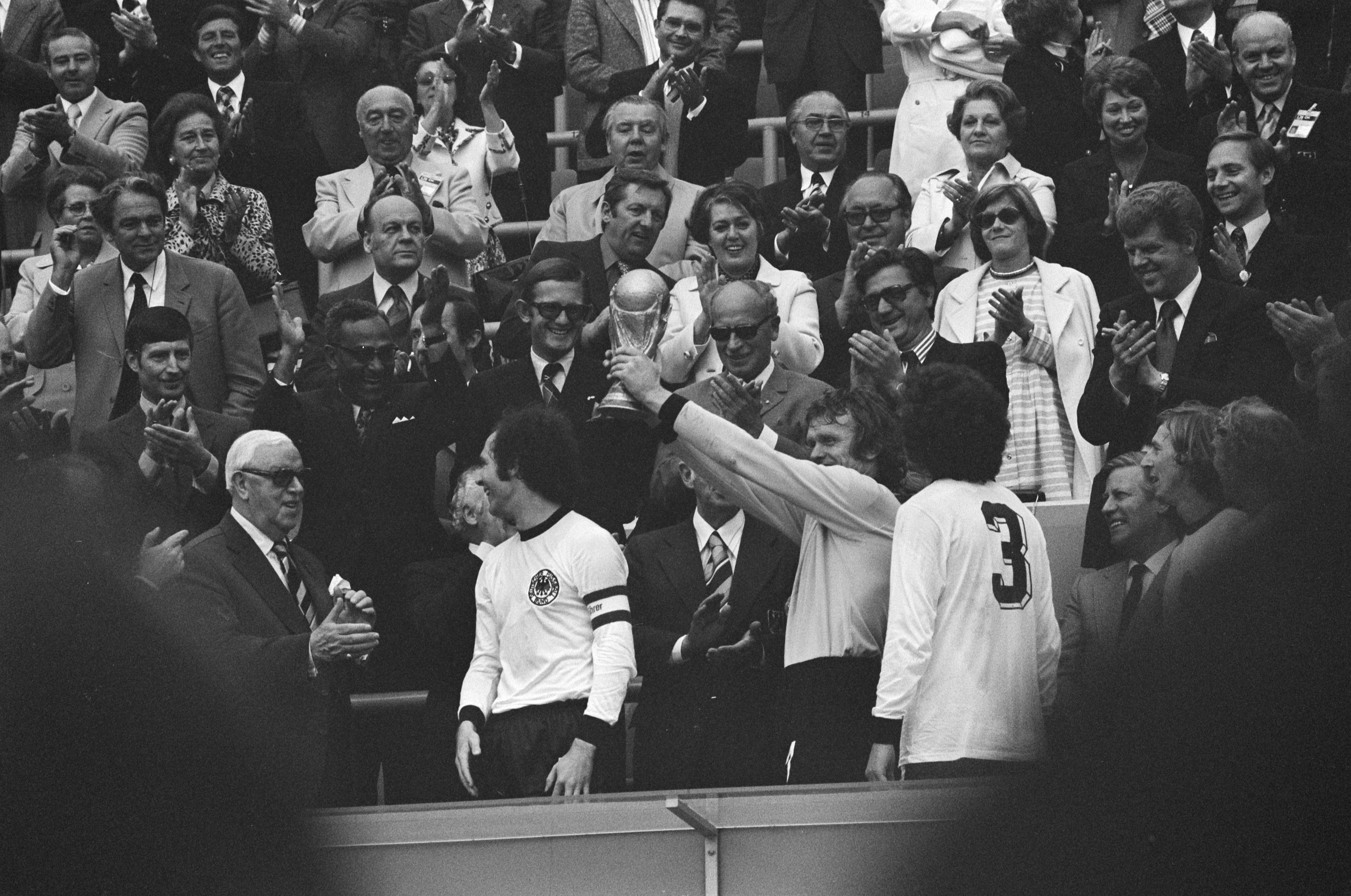 Collectie / Archief : Fotocollectie Anefo Reportage / Serie : [ onbekend ] Beschrijving : Finale wereldkampioenschap voetbal 1974 in Munchen, West Duitsland tegen Nederland 2-1; Duitse spelers met de wereldbeker Datum : 7 juli 1974 Locatie : München, Nederland, West-Duitsland Trefwoorden : finales, sport, voetbal, wereldkampioenschappen Fotograaf : Verhoeff, Bert / Anefo Auteursrechthebbende : Nationaal Archief Materiaalsoort : Negatief (zwart/wit) Nummer archiefinventaris : bekijk toegang 2.24.01.05 Bestanddeelnummer : 927-3101